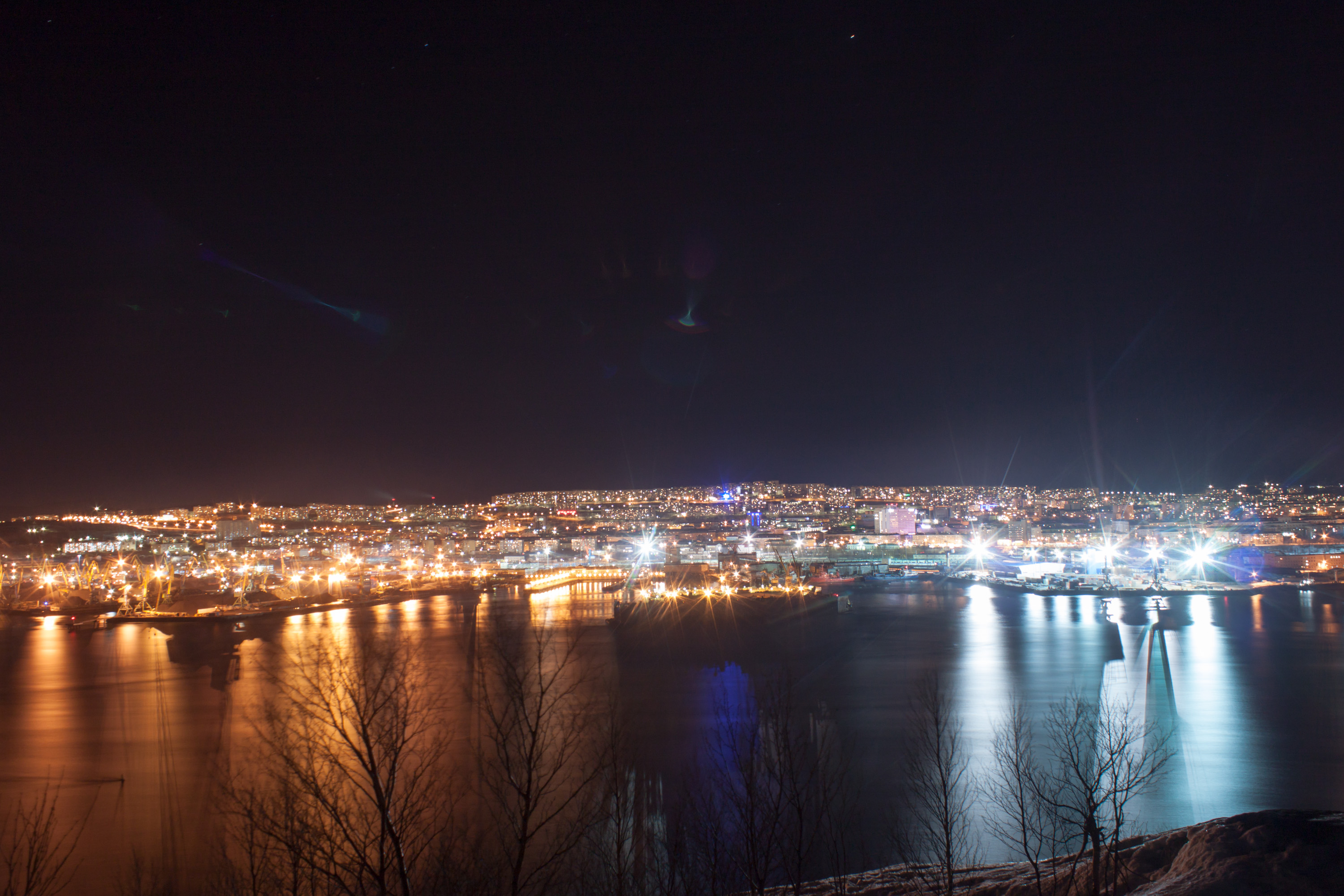 Murmansk, Murmansk Oblast, Russia